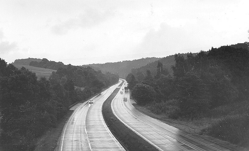 Original image description from the Deutsche FotothekTriebischtal-Tanneberg. Autobahn bei der Dammmühle